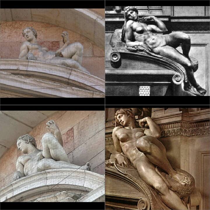 confronto tra Eva e Aurora